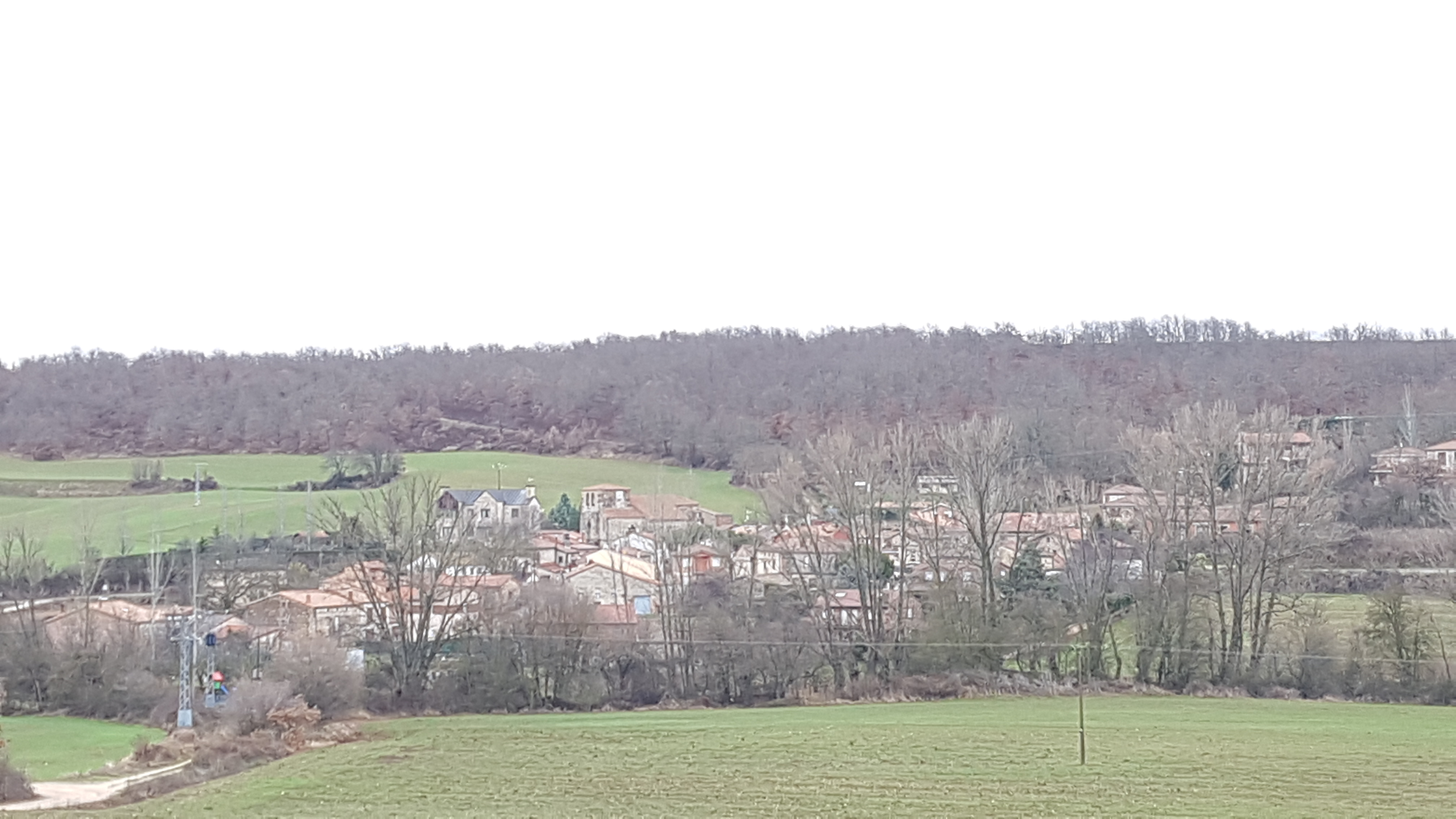 vista general Invernal de Mozoncillo de Juarros (Burgos-España)